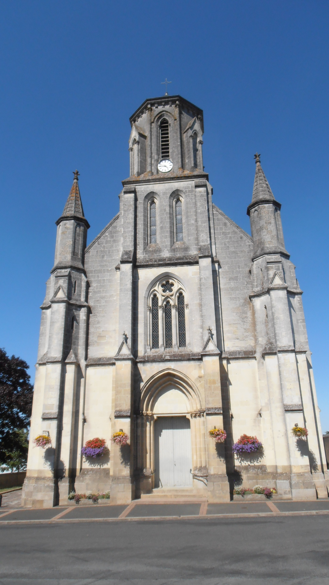 L'église de Saint-Laurent-du-Mottay (Maine-et-Loire, France).